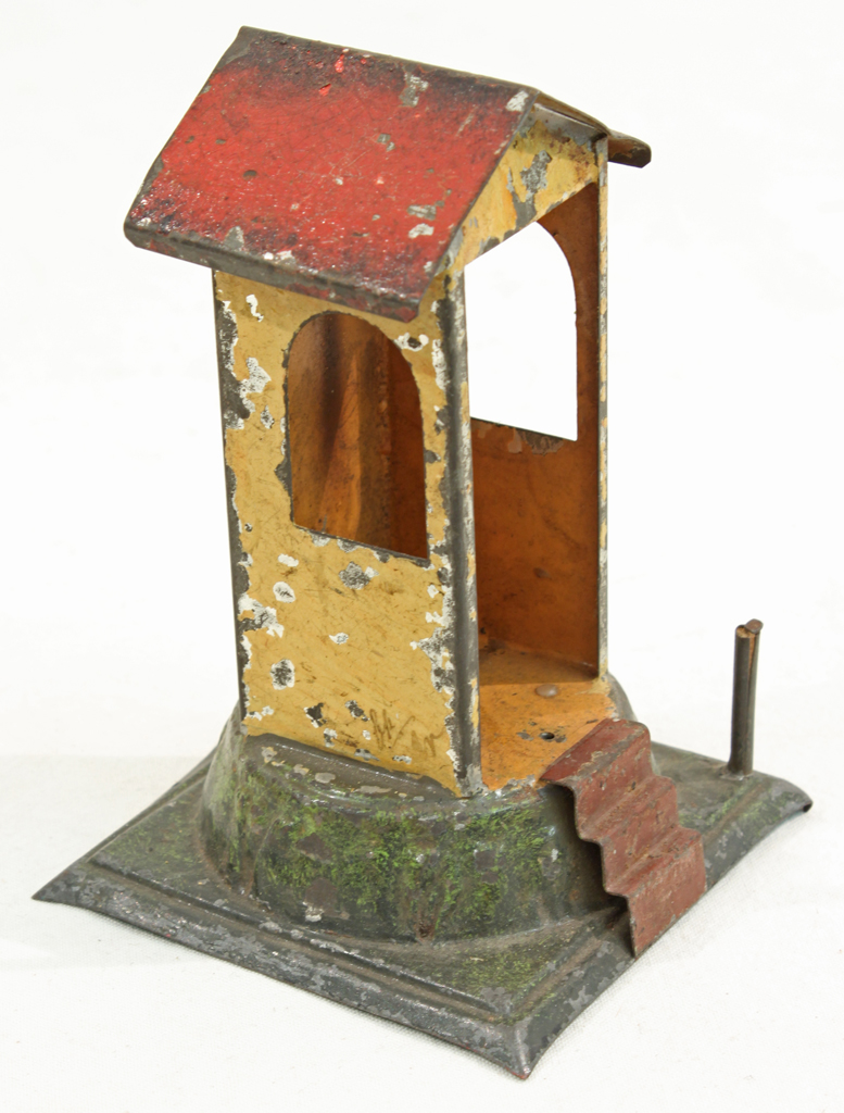 Streckenwärterhäuschen (zum Einstellen einer Figur).